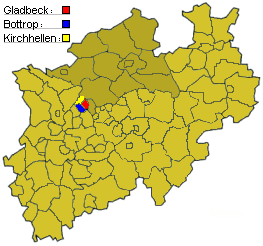 ewsKarte von NRW mit der Lage der Kommunen